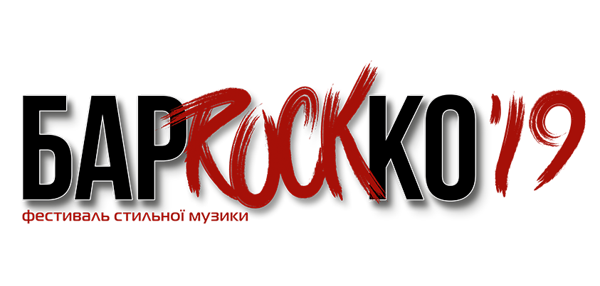 Фестиваль БарРоКо - текстове лого 2019